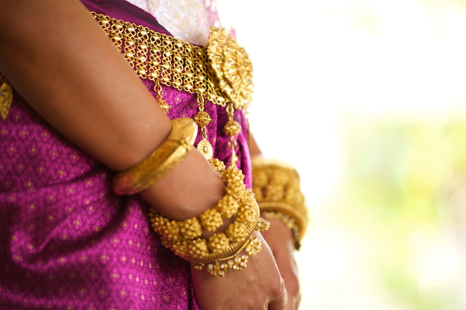 Mark J. Sebastian